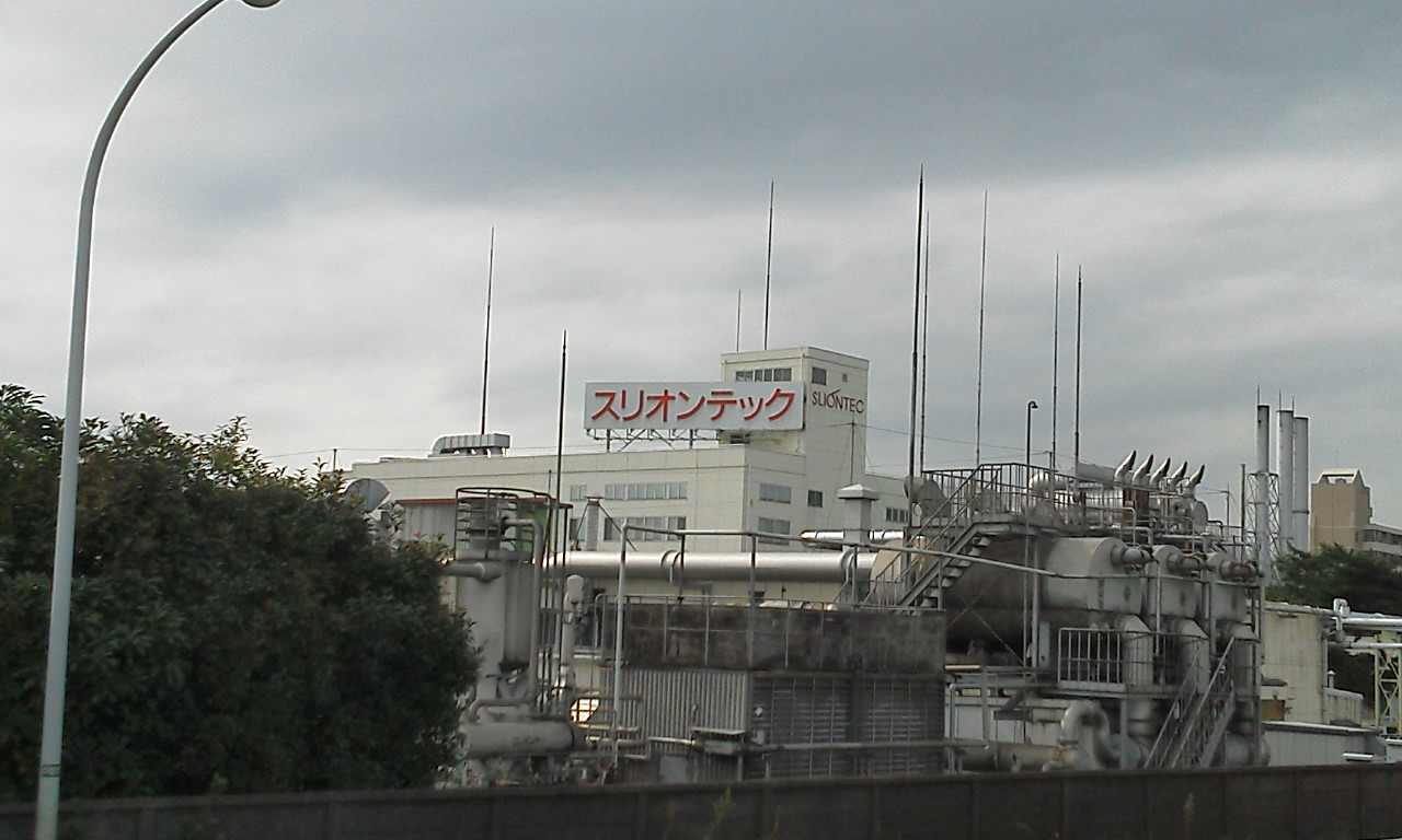 マクセルスリオンテックの本社工場（川崎市多摩区登戸）、2011年10月2日撮影。